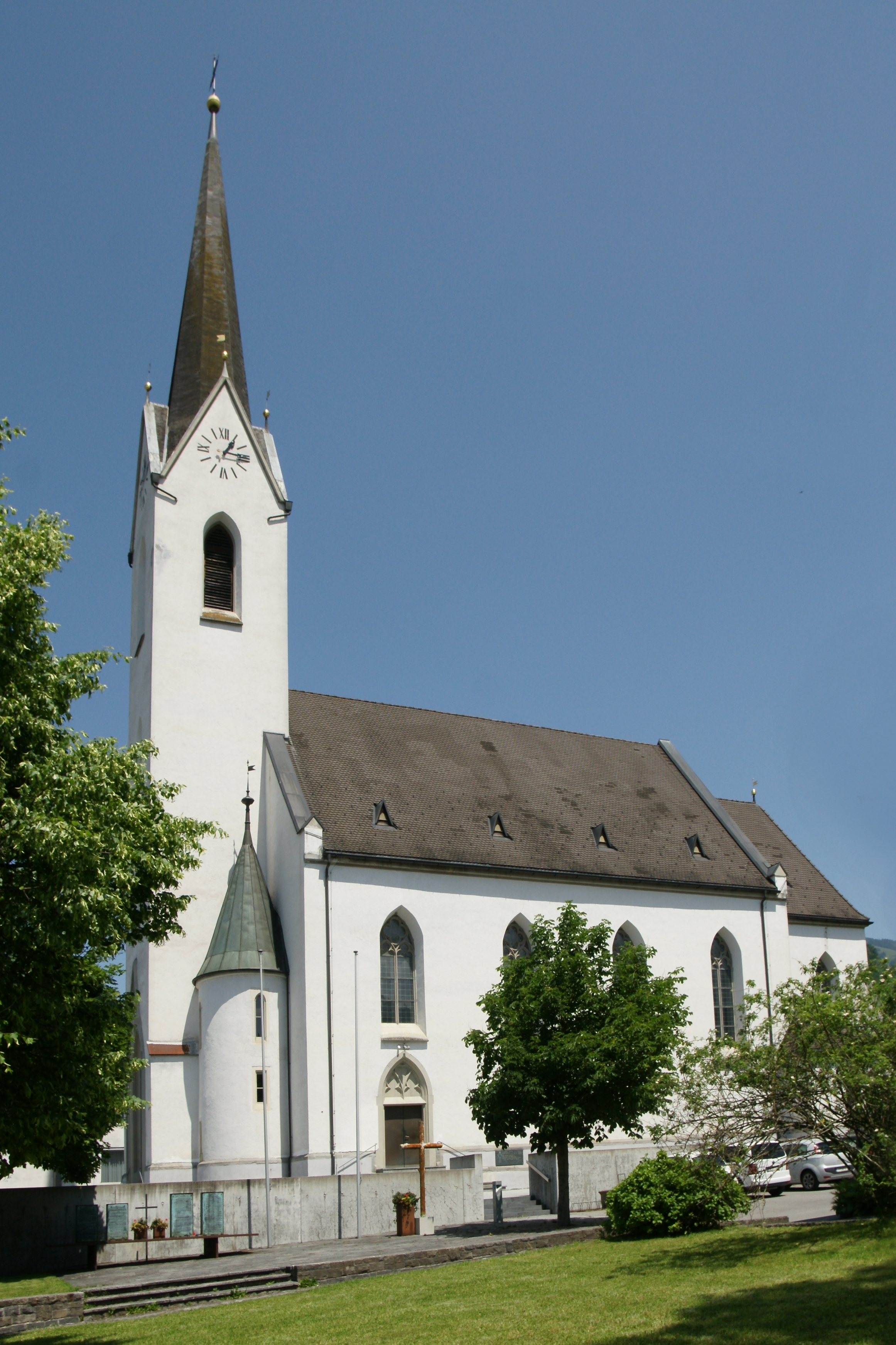 Pfarrkirche "zum Heiligsten Herzen Jesu" in Weiler (Vorarlberg).